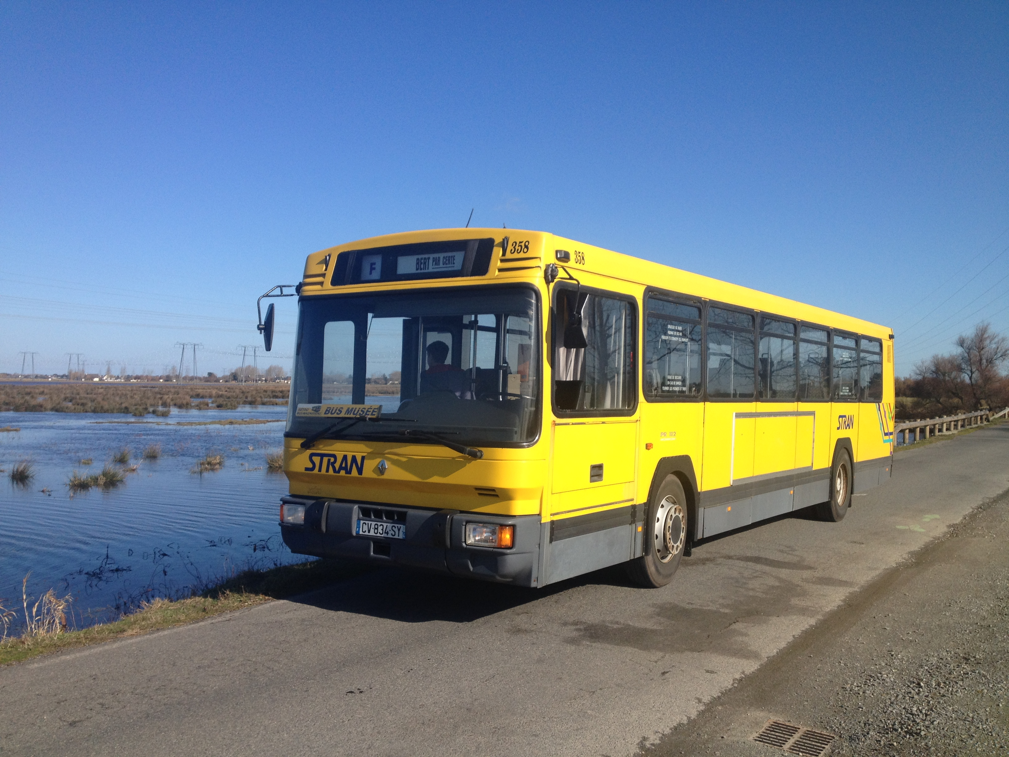 Renault PR 112 n°358 en Brière